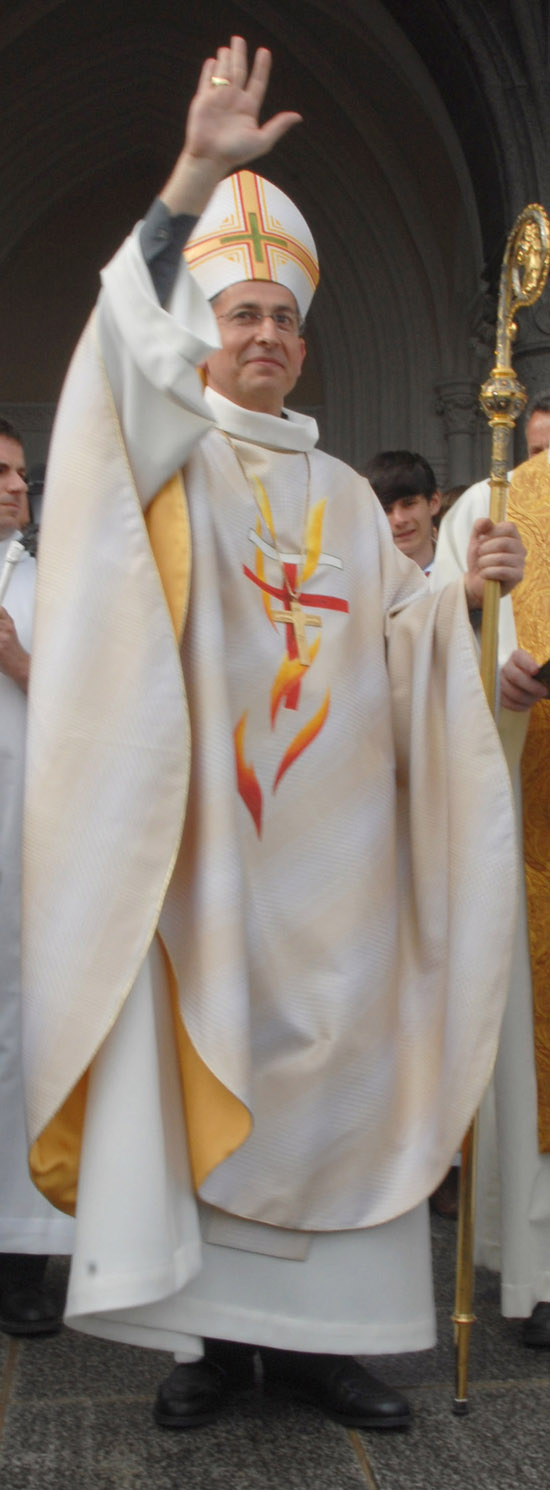 Mons. Thierry Scherrer, il giorno della sua consacrazione, il 6 luglio 2008, a Laval-Mayenne.